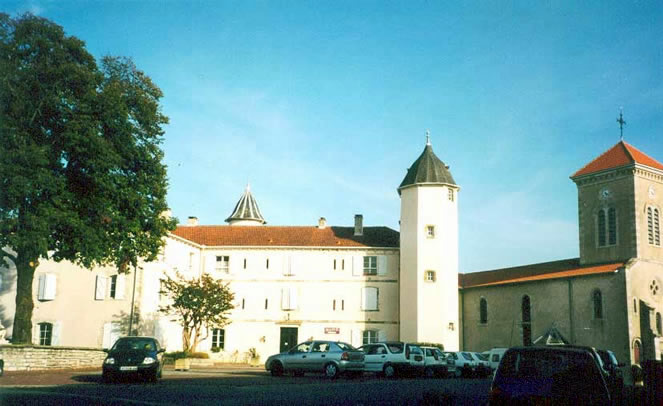 Vue de la place de Bardos Pyrénées).